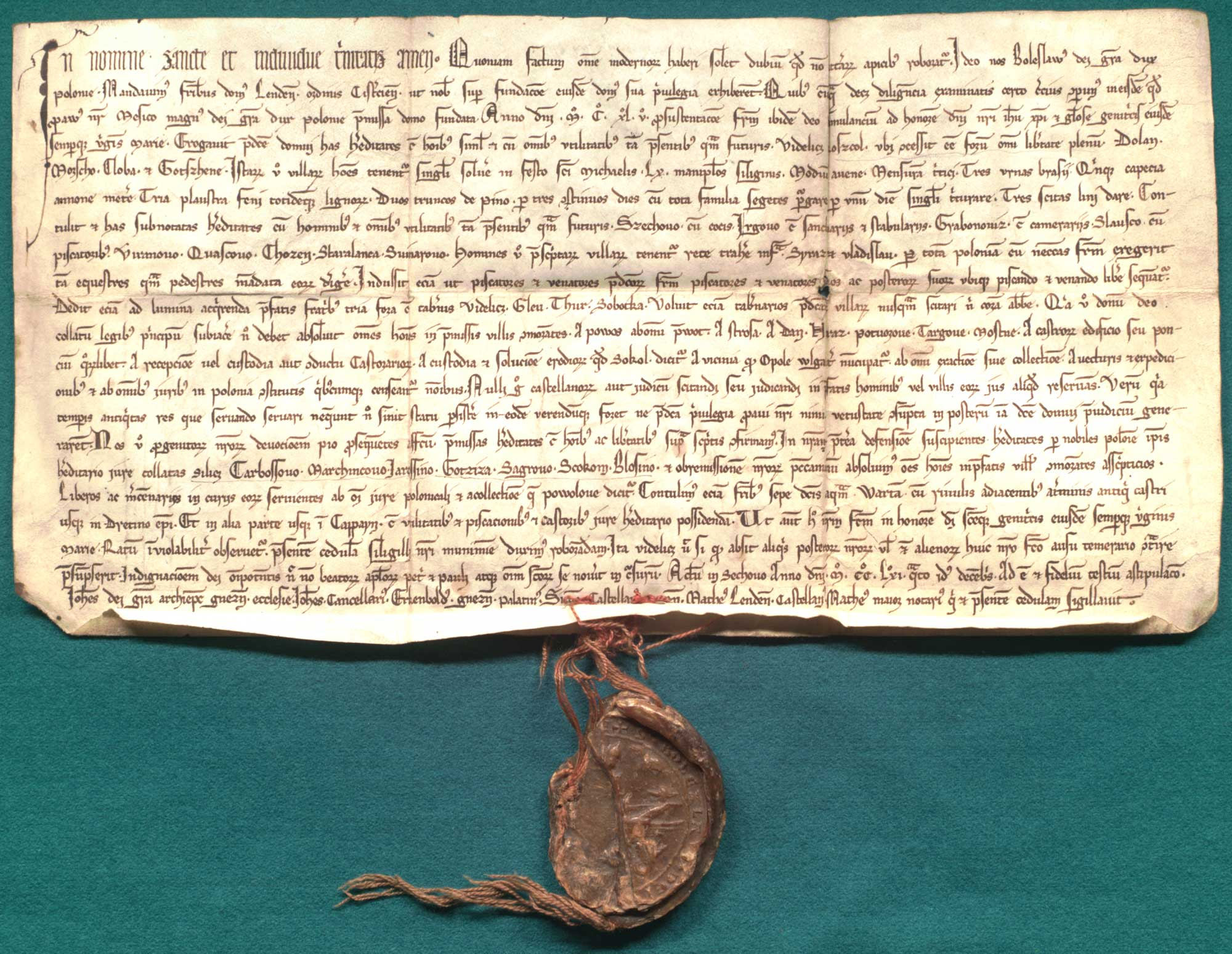 Bolesław V Wstydliwy, książę polski, potwierdza nadanie Mieszka Starego z 1145 r. dla klasztoru cystersów w Lądzie. Język: łac. Opis zewnętrzny: oryg., 1 k. pergaminowa, 21 x 41 + 2 cm; fragment pieczęci na sznurze